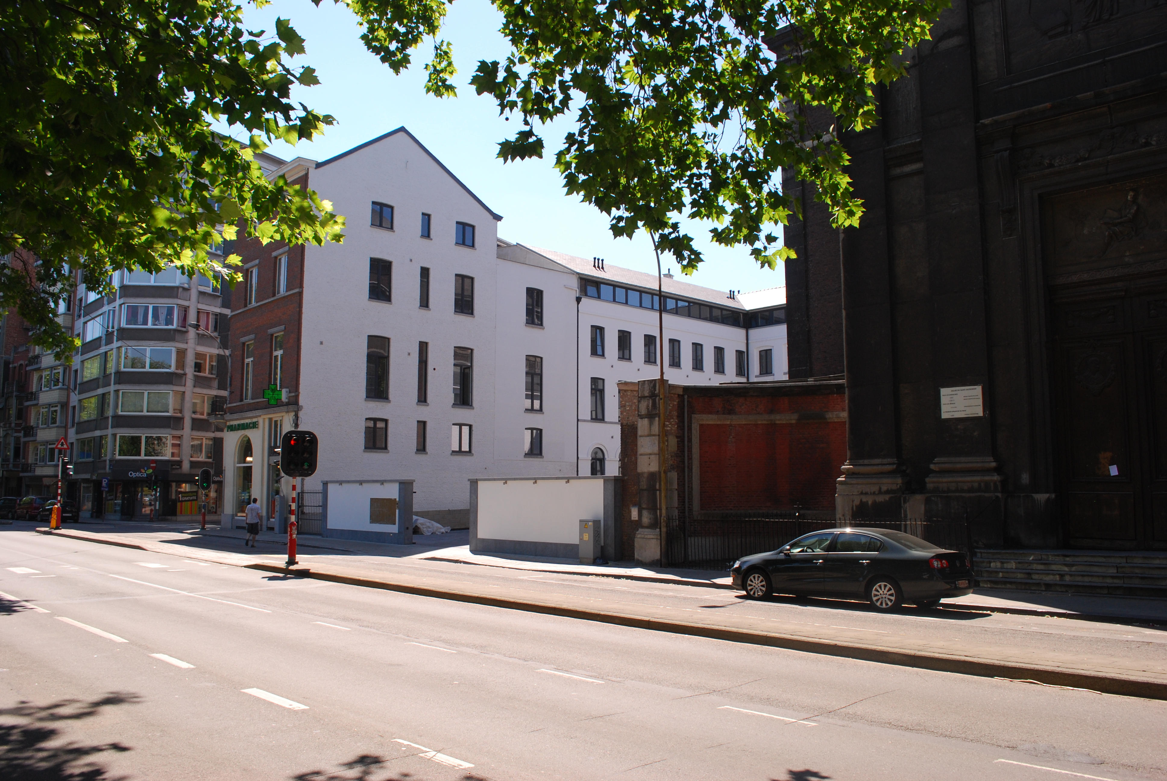 Le boulevard d'Avroy à Liège.